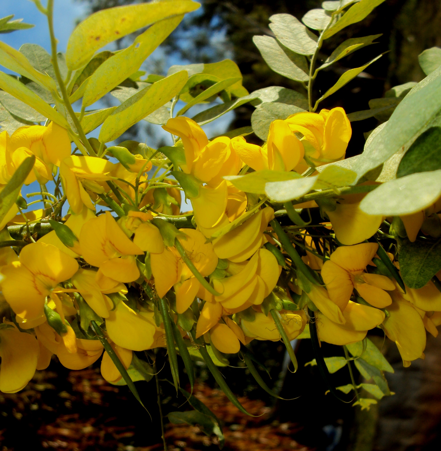 Inflorescencia Diphysa Americana.